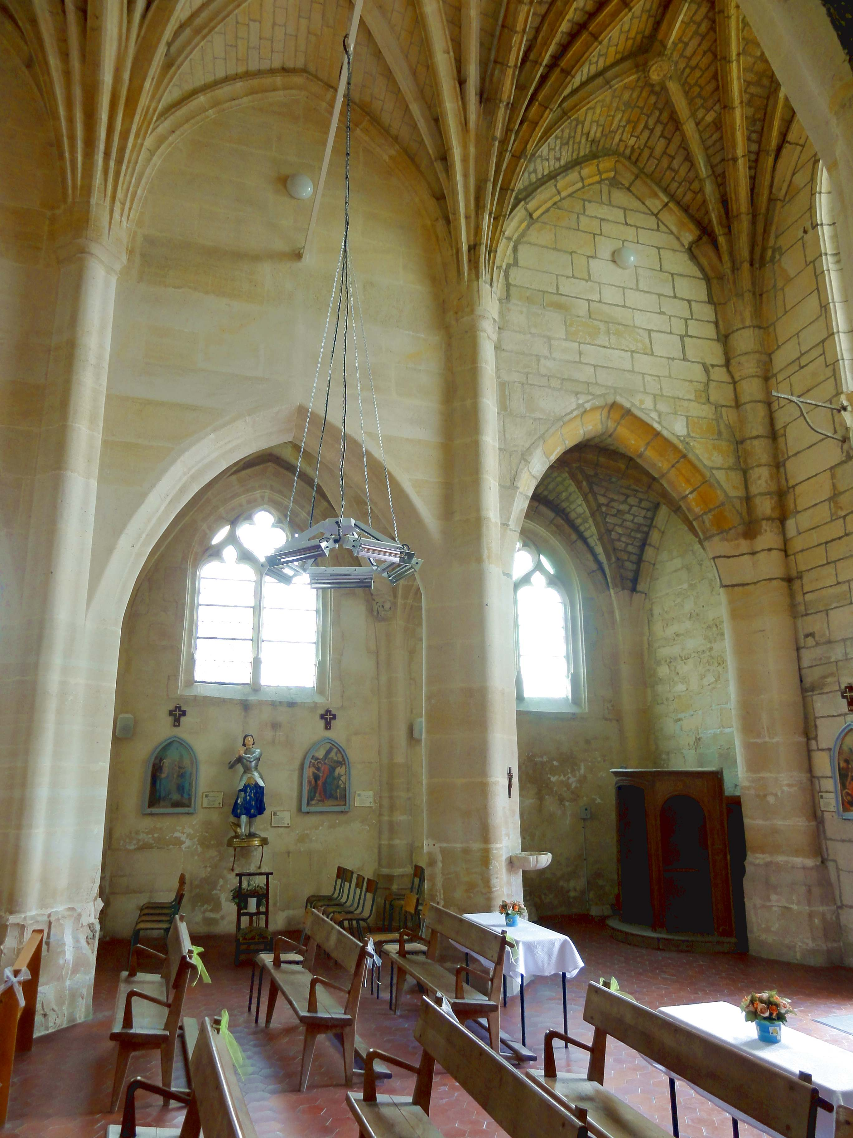 Intérieur de l'église - voir titre.